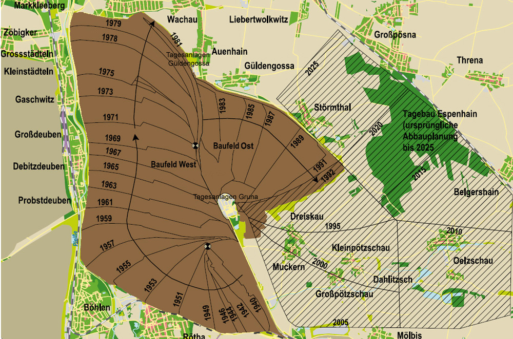 Darstellung der zeitlichen Entwicklung des Tagebaus Espenhain